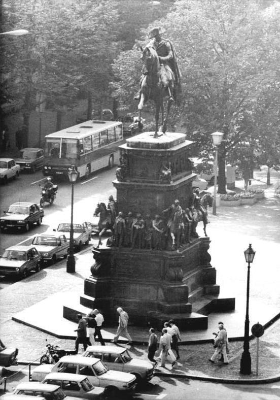 ADN-ZB-Hirschberger-18.9.89-Berlin: Impressionen- Die Straße ""Unter den Linden"" mit dem Denkmal "Friedrich II." ist immer wieder ein Anziehungspunkt für die Berliner und ihre Gäste. Das Reiterstandbild wurde 1851 enthüllt und gilt als bedeutendstes Werk des Bildhauers Christian Daniel Rauch.